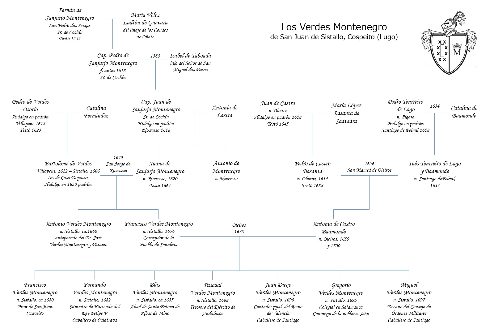 Este árbol genealógico corresponde a los primeros miembros de la familia Verdes Montenegro, que es una escisión de los Sanjurjo Montenegro, todos de Tierra Llana (Lugo), Lugo.